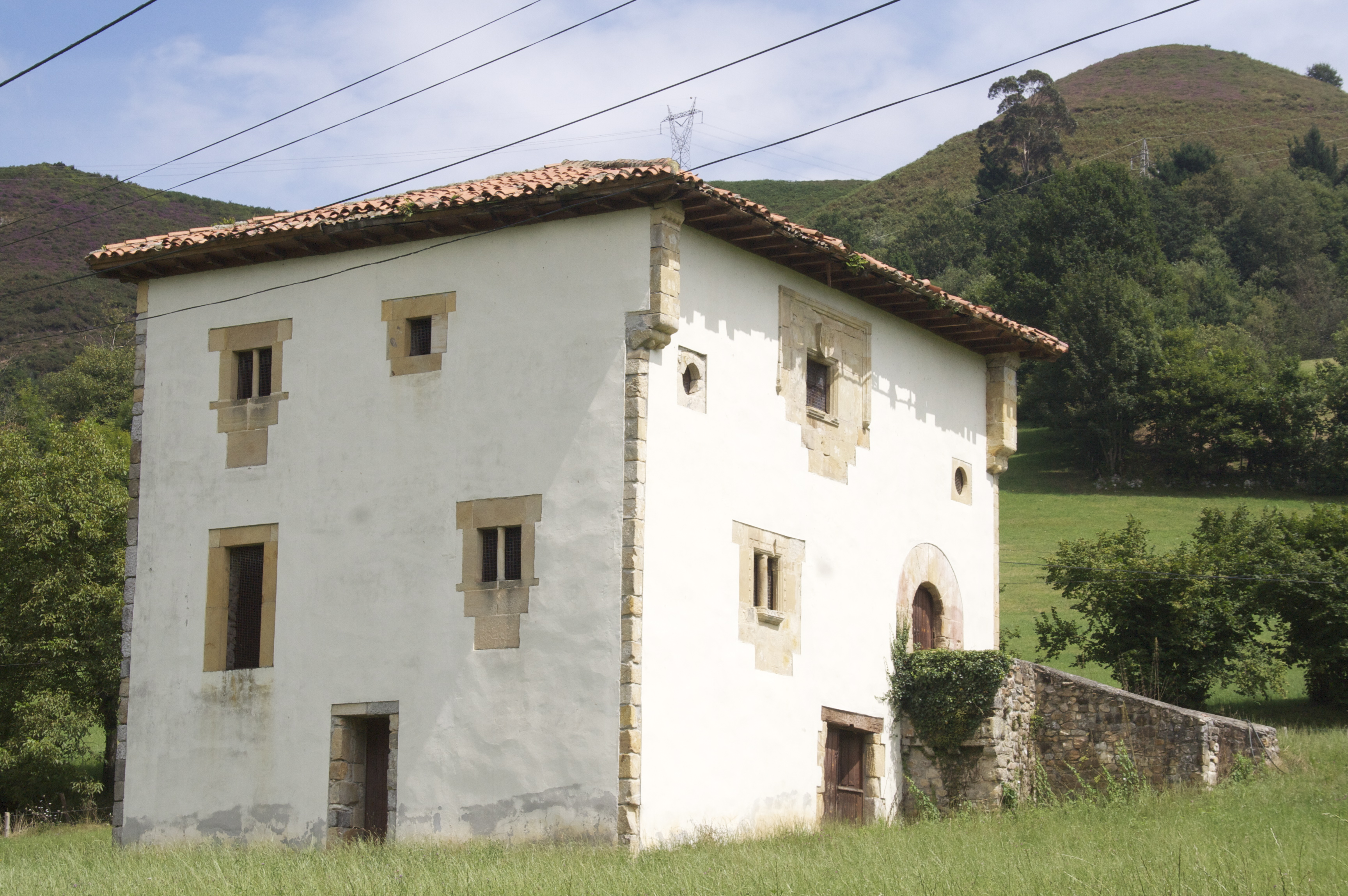 Torre de Sirviella, Sirviella, Onís, Asturias.